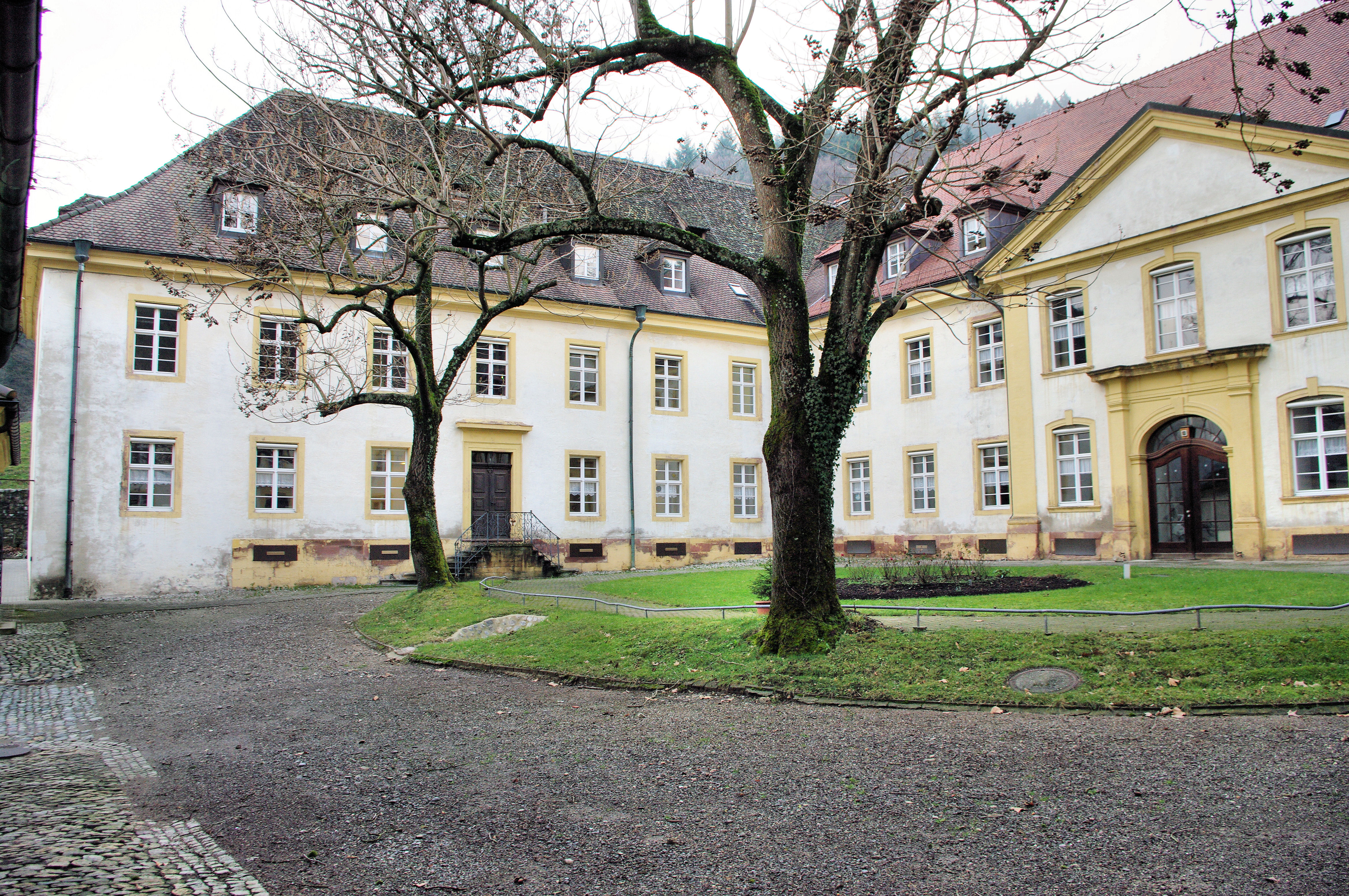 Bilder der Kartause Freiburg